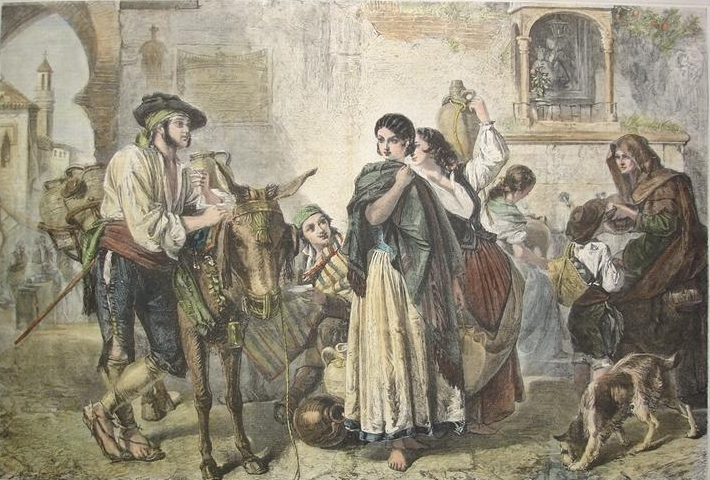 Obra titulada "Cotilleos en el pozo", ambientada en la Sevilla del siglo XIX. Se trata de una xilografía coloreada a mano basada en un cuadro de J. Philips. Procede de un periódico alemán.